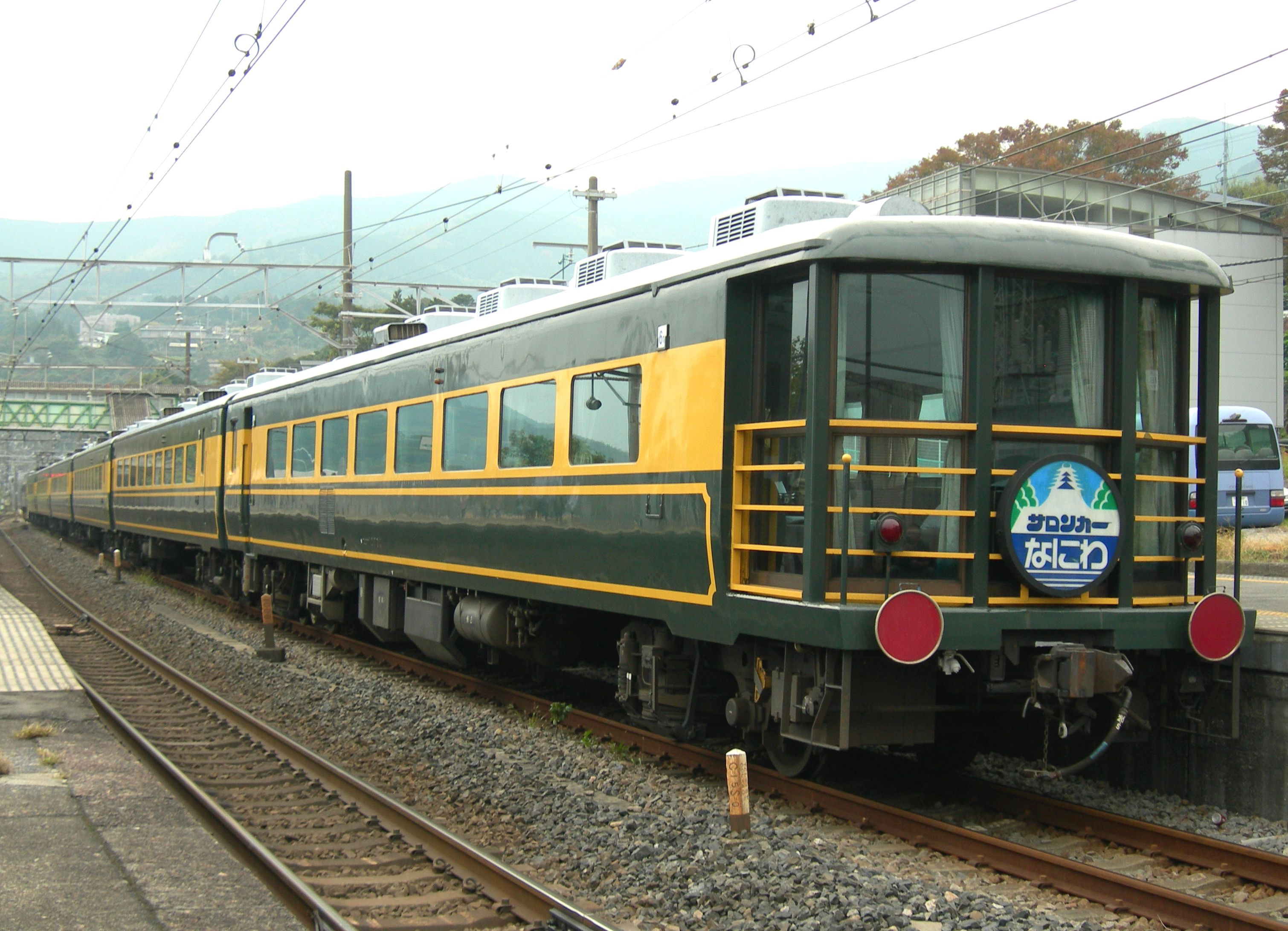 JR西日本 サロンカーなにわ